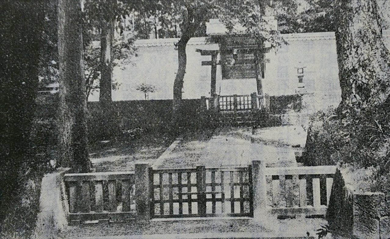 島根県隠岐郡海士町にある「後鳥羽天皇御火葬塚」。1933年。